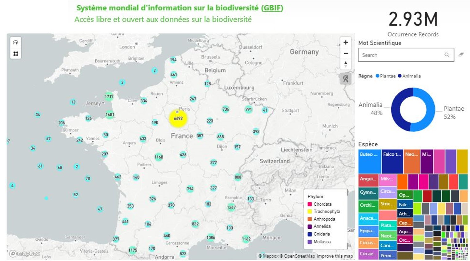 2,9 millions d'enregistrements de localisation d'espèces animales et végétales en France avec des données du GBIF.